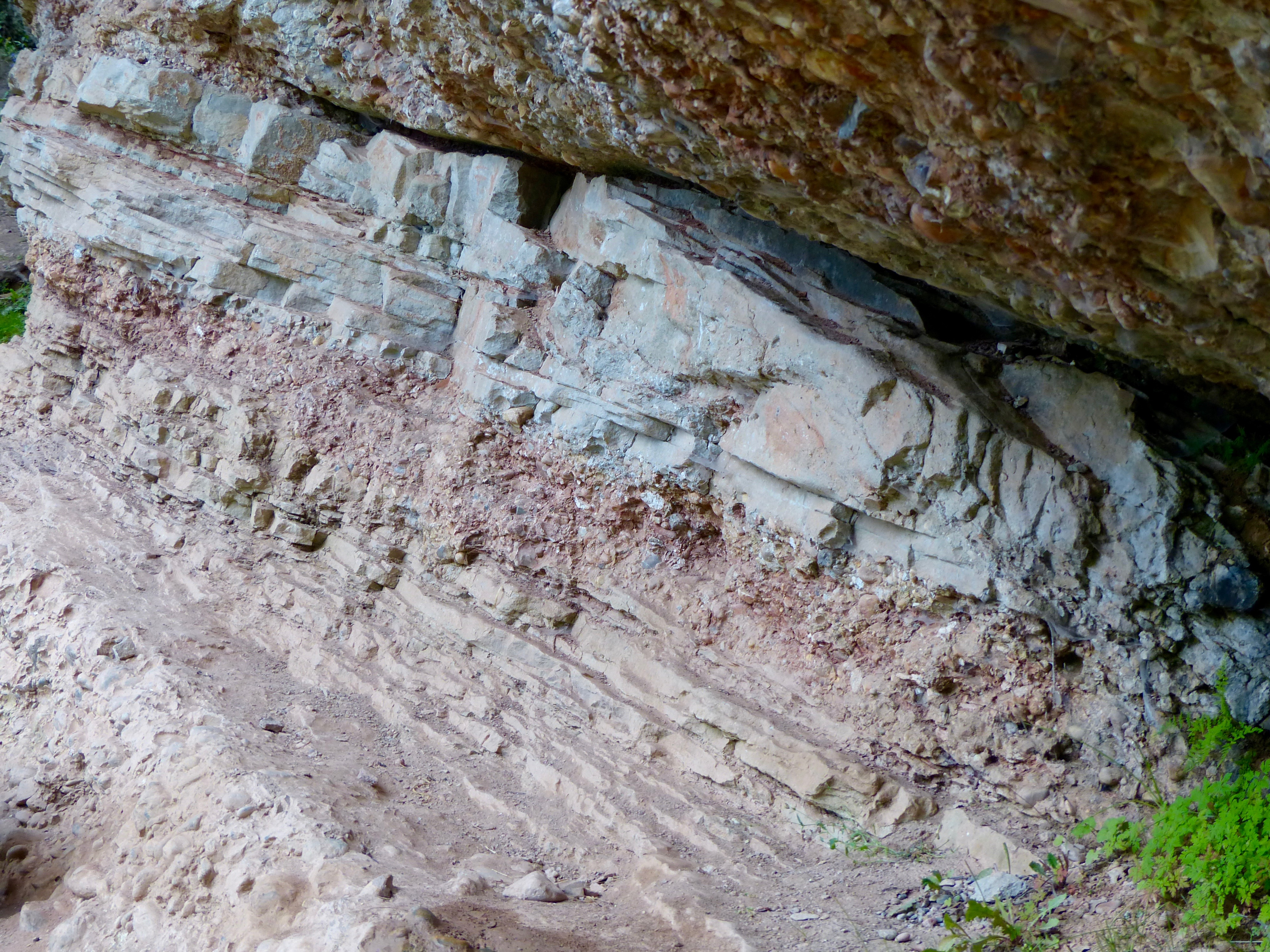 WikiProjekt Landstreicher 2016: Geotop Molassewand NW Seltmans: Nagelfluh (Obere Süßwassermolasse), genutzt als Klettergarten, Wechsellagerung Nagelfluh mit Mergelsteinen